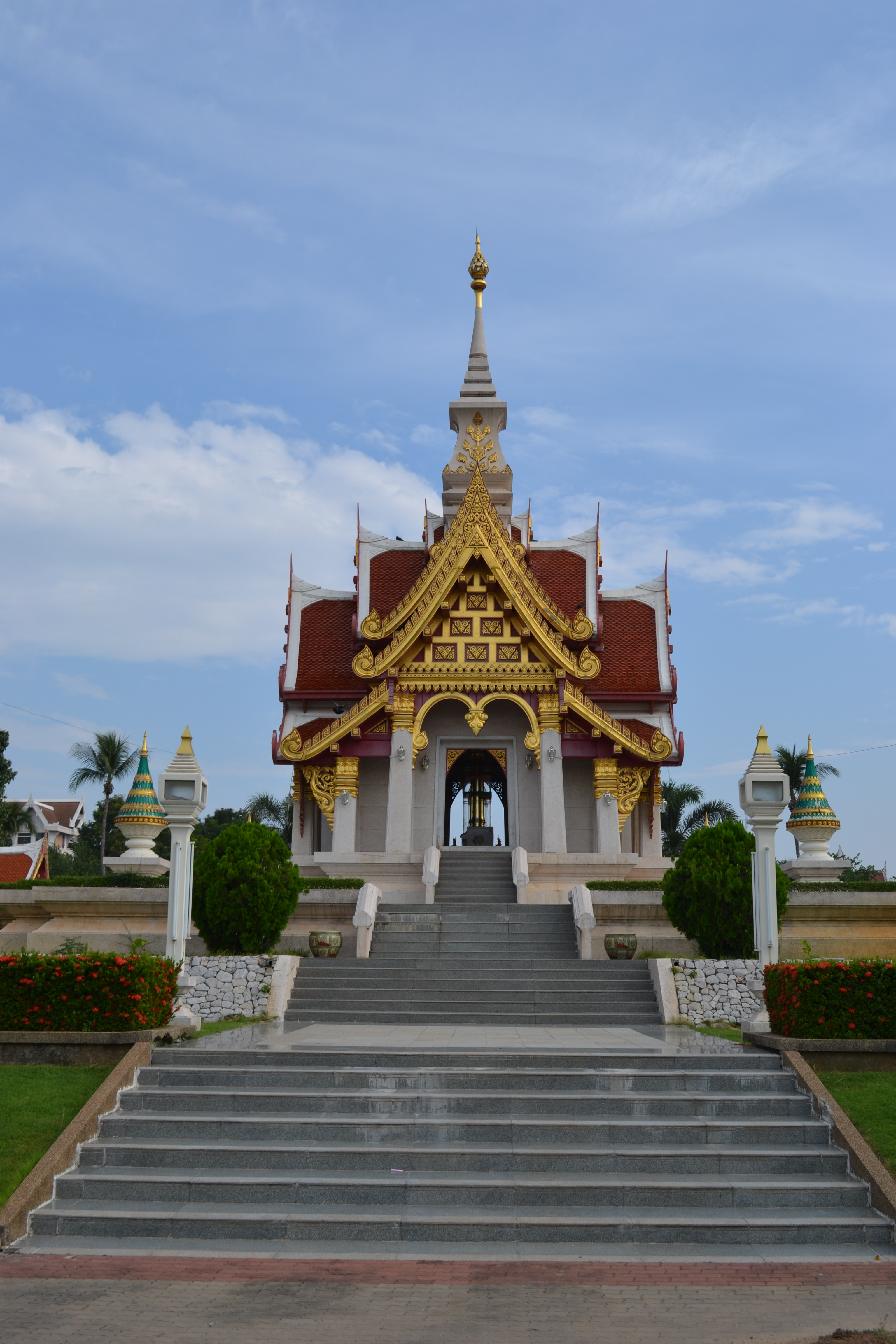 ศาลหลักเมืองจังหวัดอุดรธานี : Udonthani City Pillar Shine